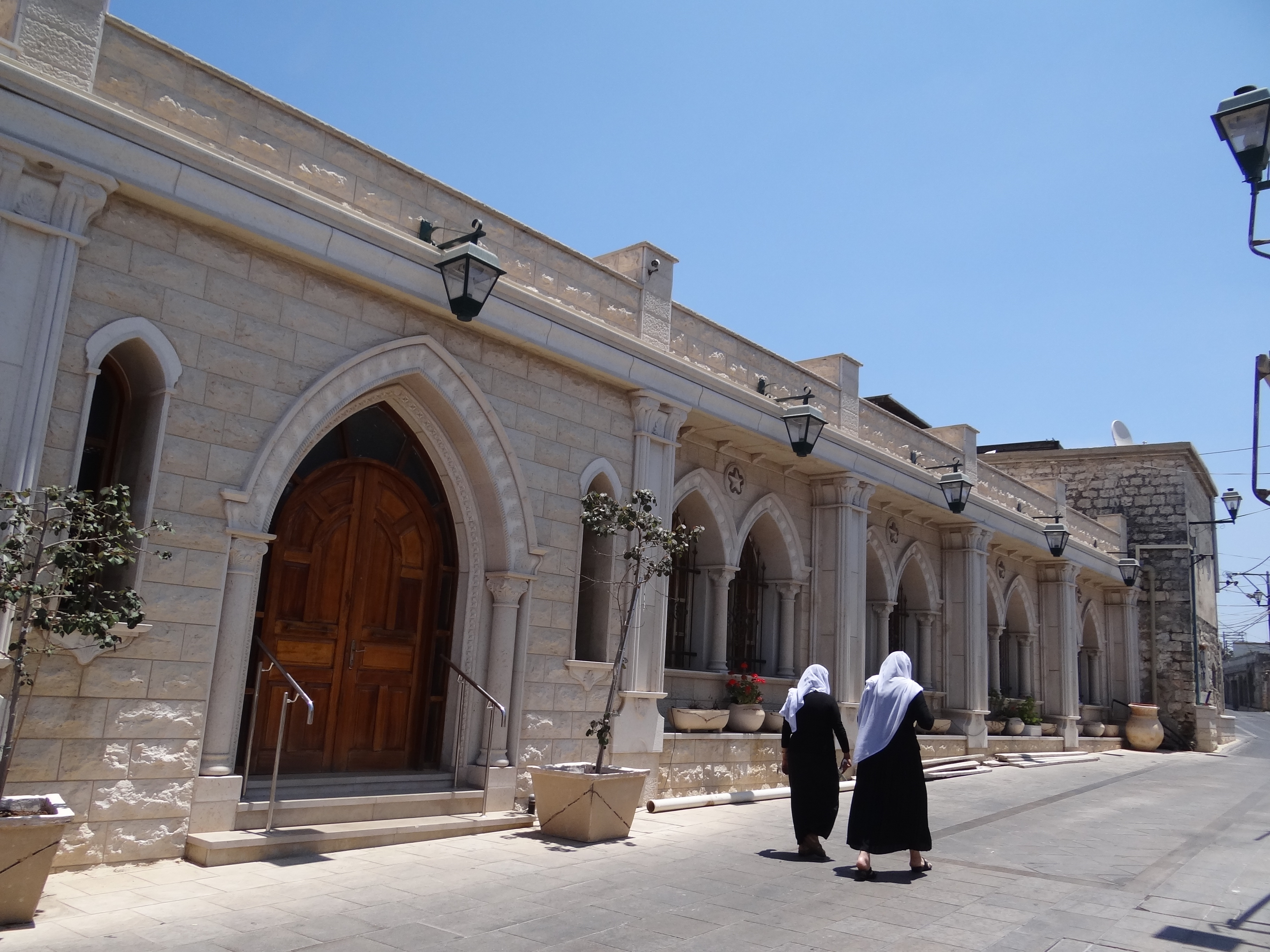 מקאם הנביא אבו אברהים (מקאם=אתר), הוא אתר דתי השוכן בדאלית אל-כרמל בשכונה המערבית לא רחוק מהמרכז הישן של היישוב